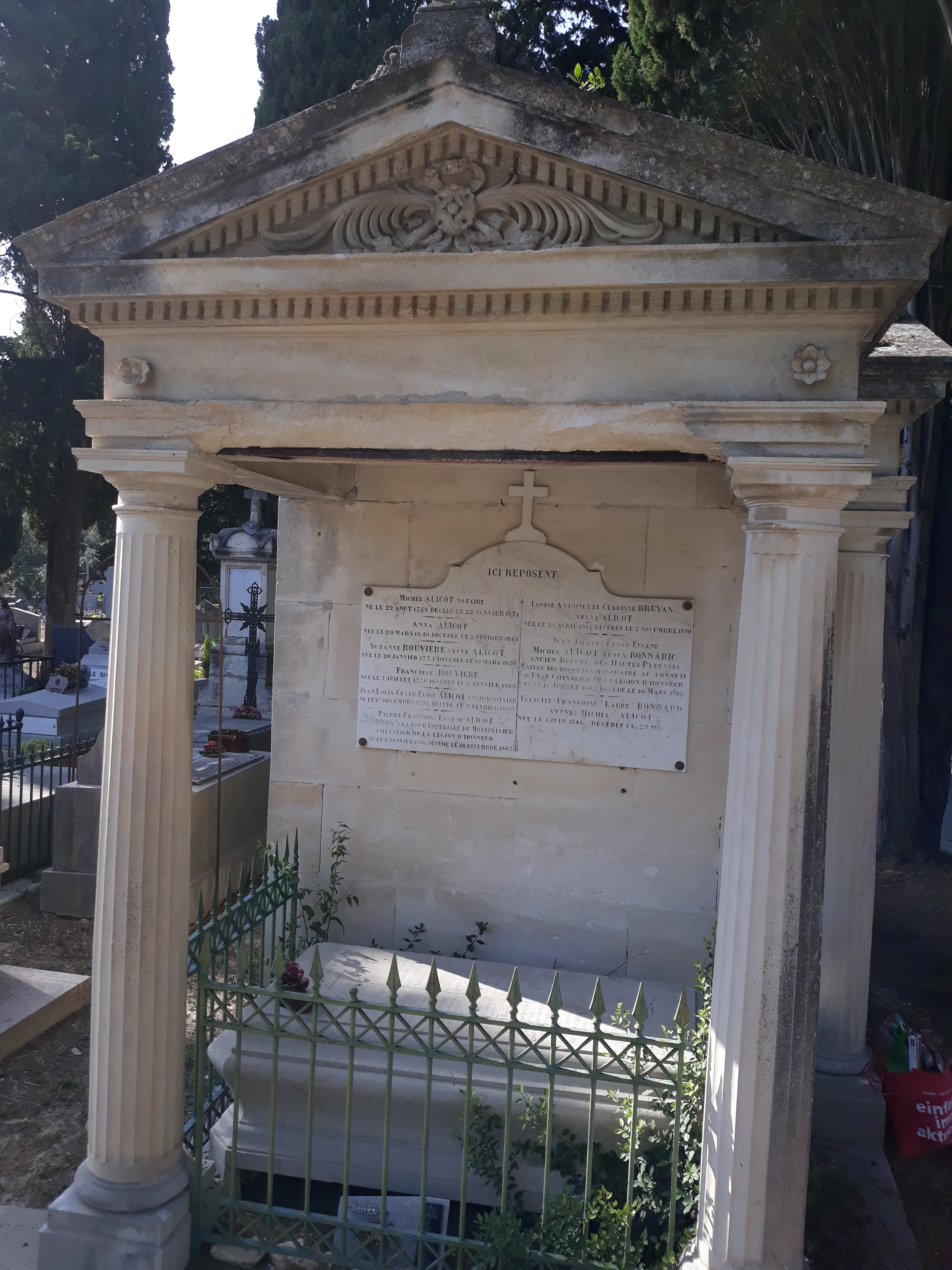 Das Grab des französischen Politikers Jean-Jacques Alicot im Familiengrab auf dem Cimetière Saint-Lazare in Montpellier.